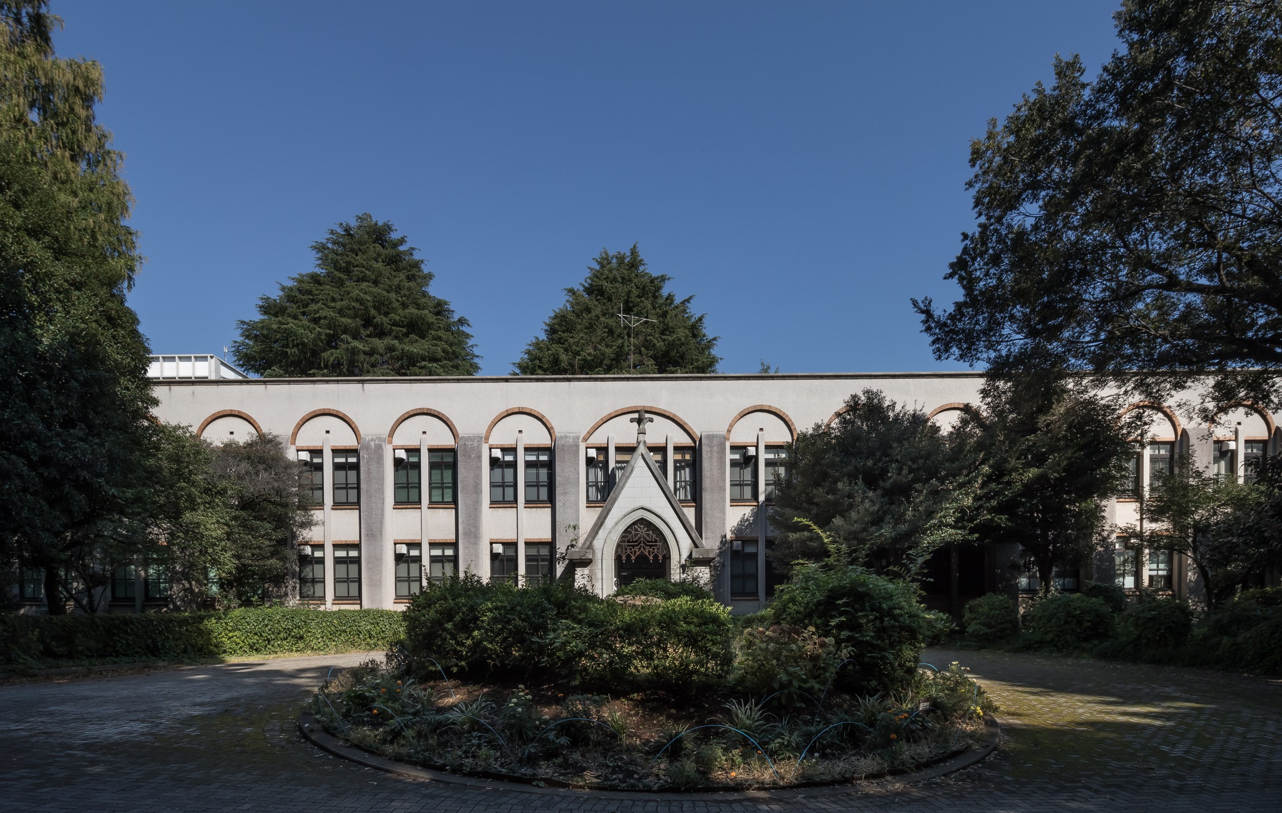 東京大学駒場キャンパス、101号館。旧制第一高等学校特設高等科。内田祥三設計 (1935)